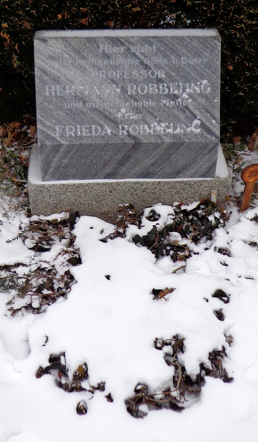 Feuerhalle Simmering - Urnenhain - ehrenhalber gewidmetes Urnengrab von Hermann Röbbeling (Abteilung 1, Ring 3, Gruppe 9, Nummer 22).